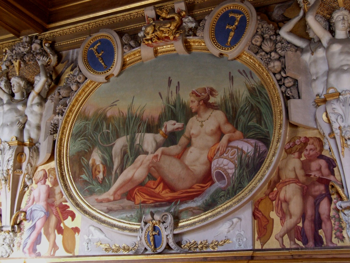 Francois I Gallery, Château de Fontainebleau, France